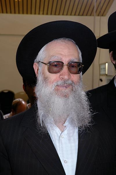 Israeli rabbi Ya'akov Yosef, son of rabbi Ovadiya Yosef